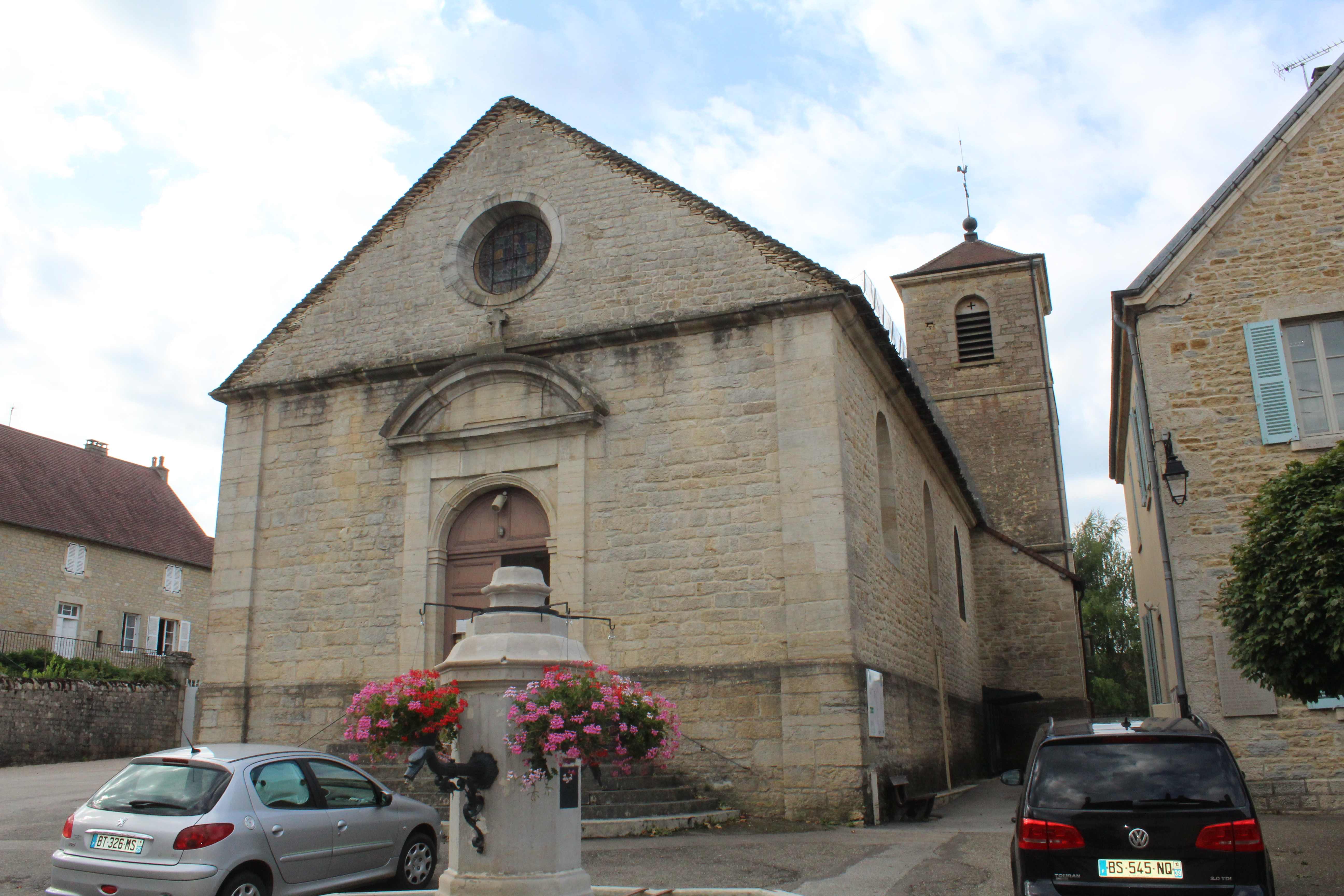 Église Saint-Léger de Gevingey.